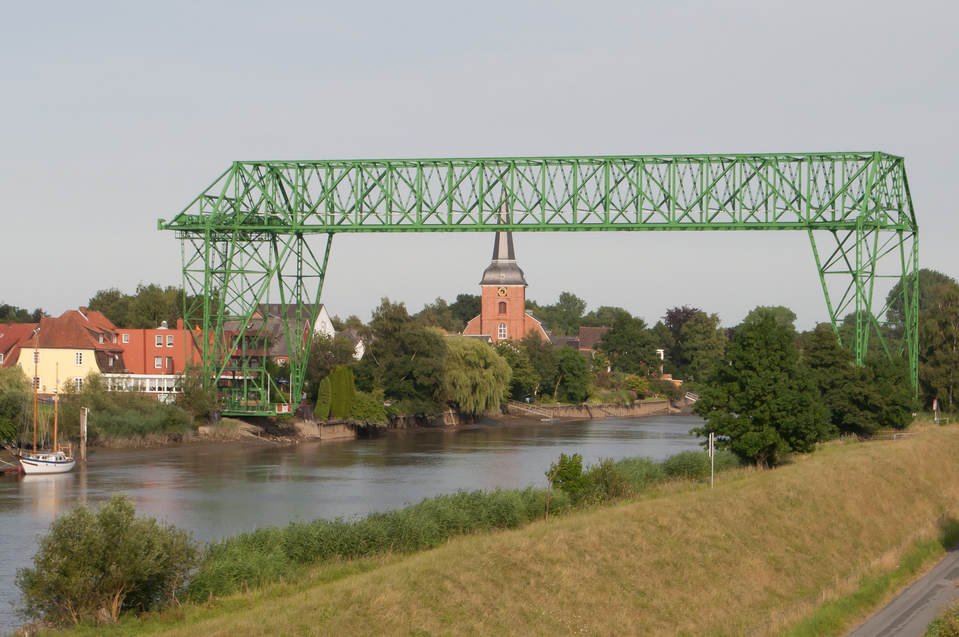 Schwebefähre Osten mit St. Petri-Kirche. This is a photograph of an architectural monument. .204.400.011